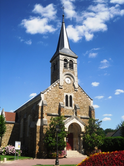 L'église catholique Sainte-Geneviève à Sainte-Geneviève-des-Bois (91)